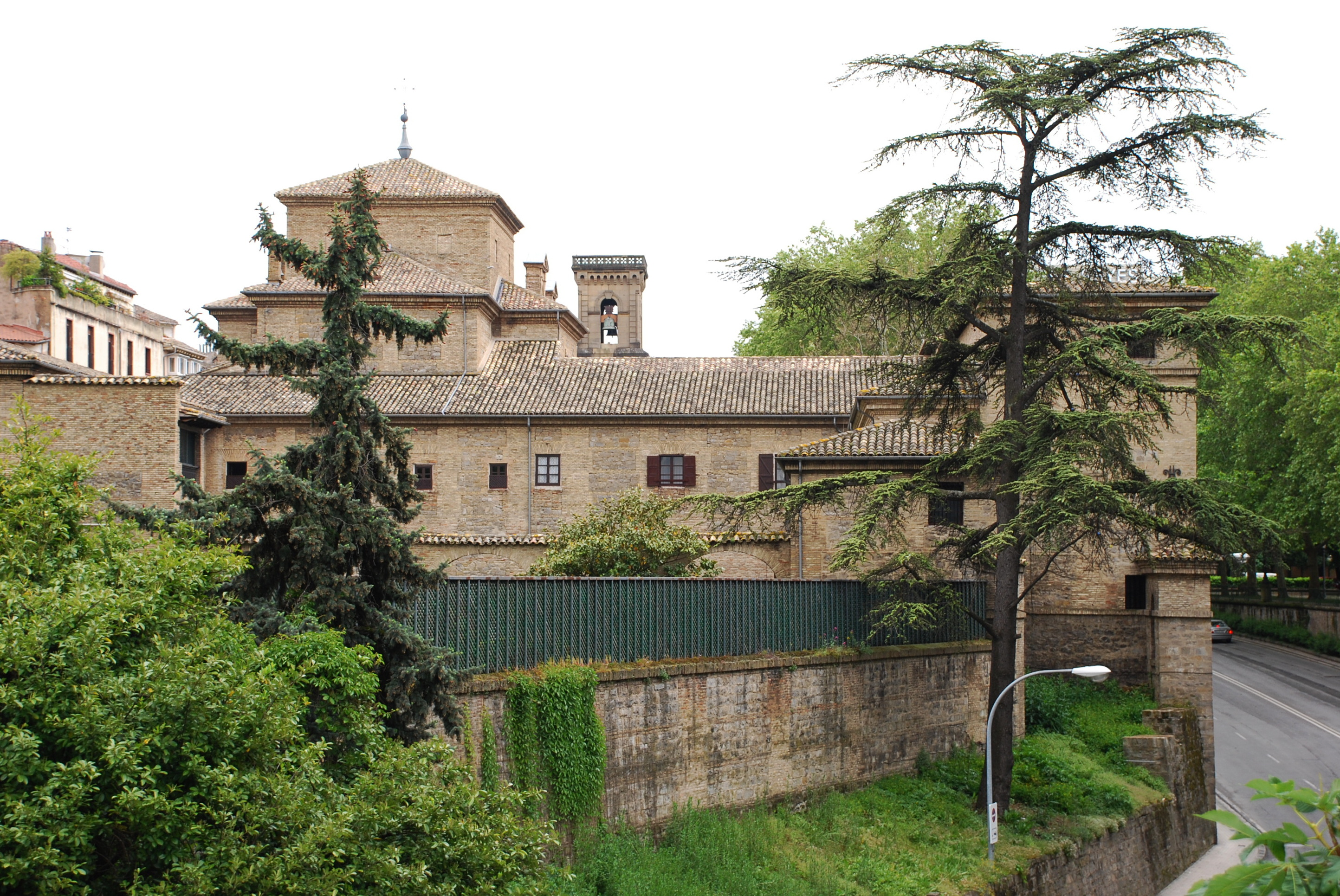 Convento de Agustinas Recoletas en Pamplona, Navarra (España)